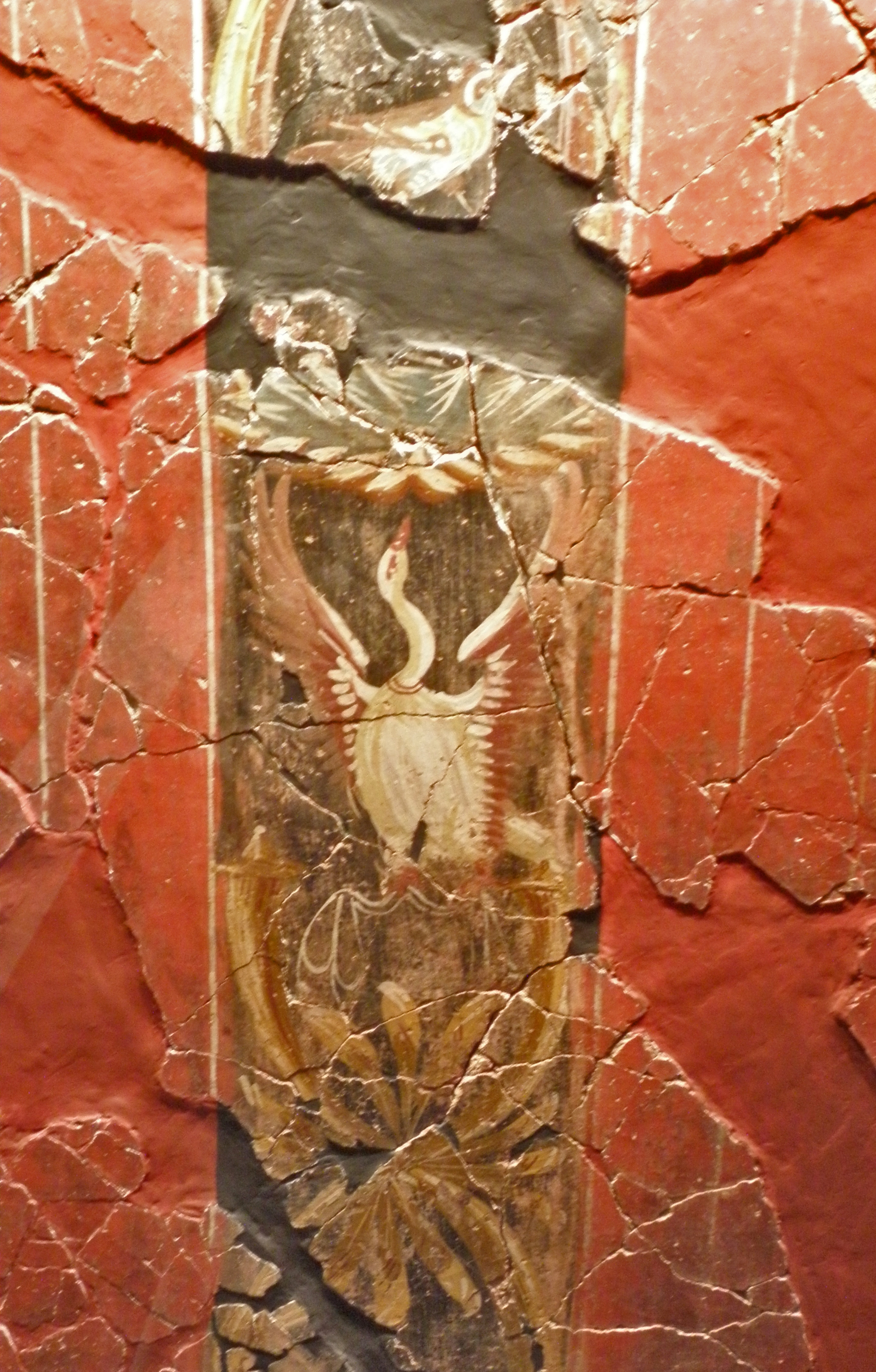 Esta foto participa en el juego En otro lugar de Flickr. Si no perteneces al grupo, no contestes, por favor. Si quieres contestar, únete